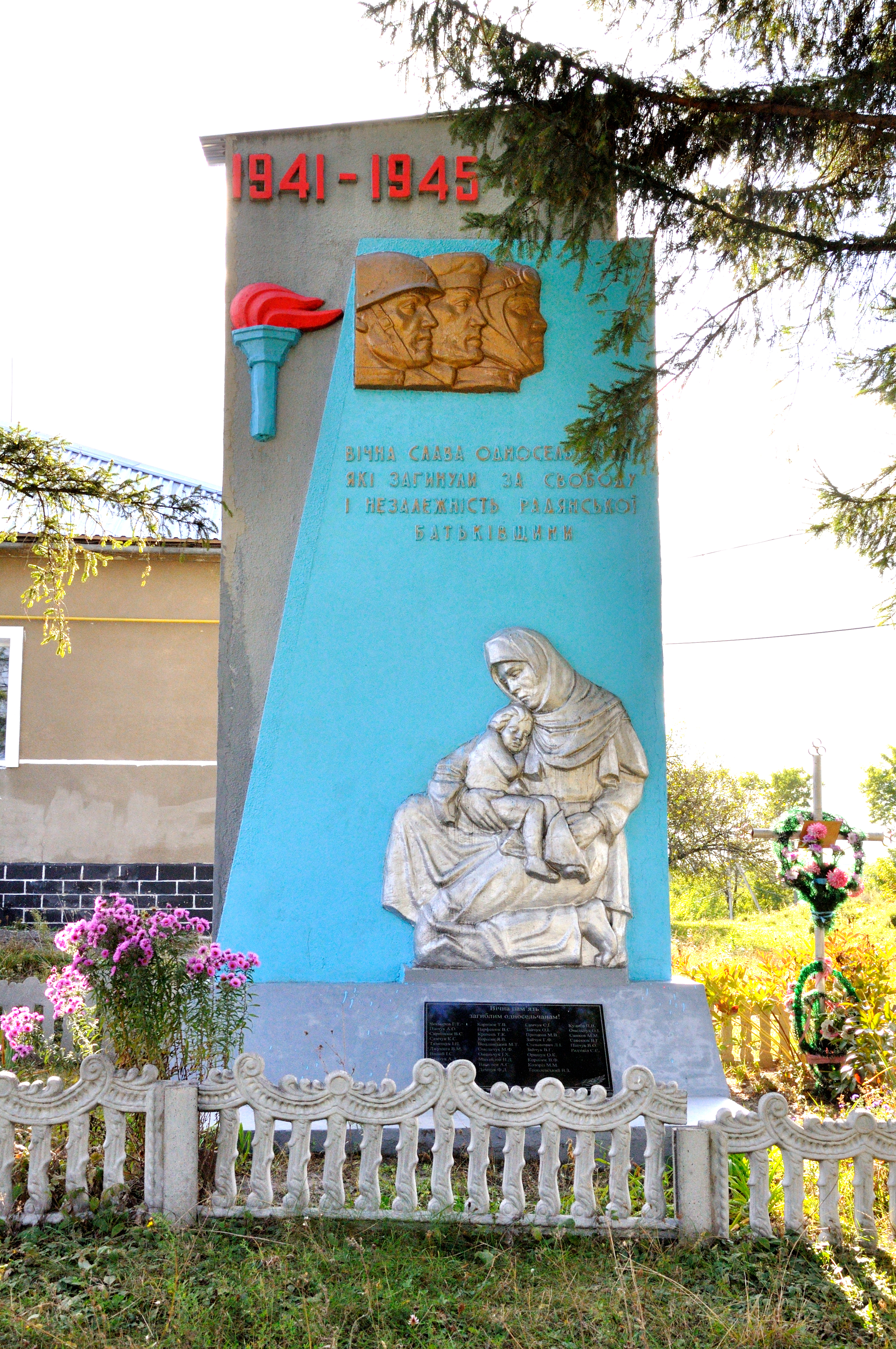 Пам’ятник воїнам- односельчанам, с. Обарів